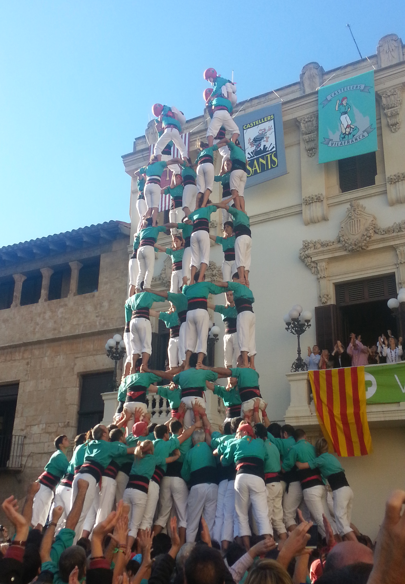 Primer 7 de 9 amb folre de la història dels castells. Fet pels Castellers de Vilafranca a Vilafranca del Penedès